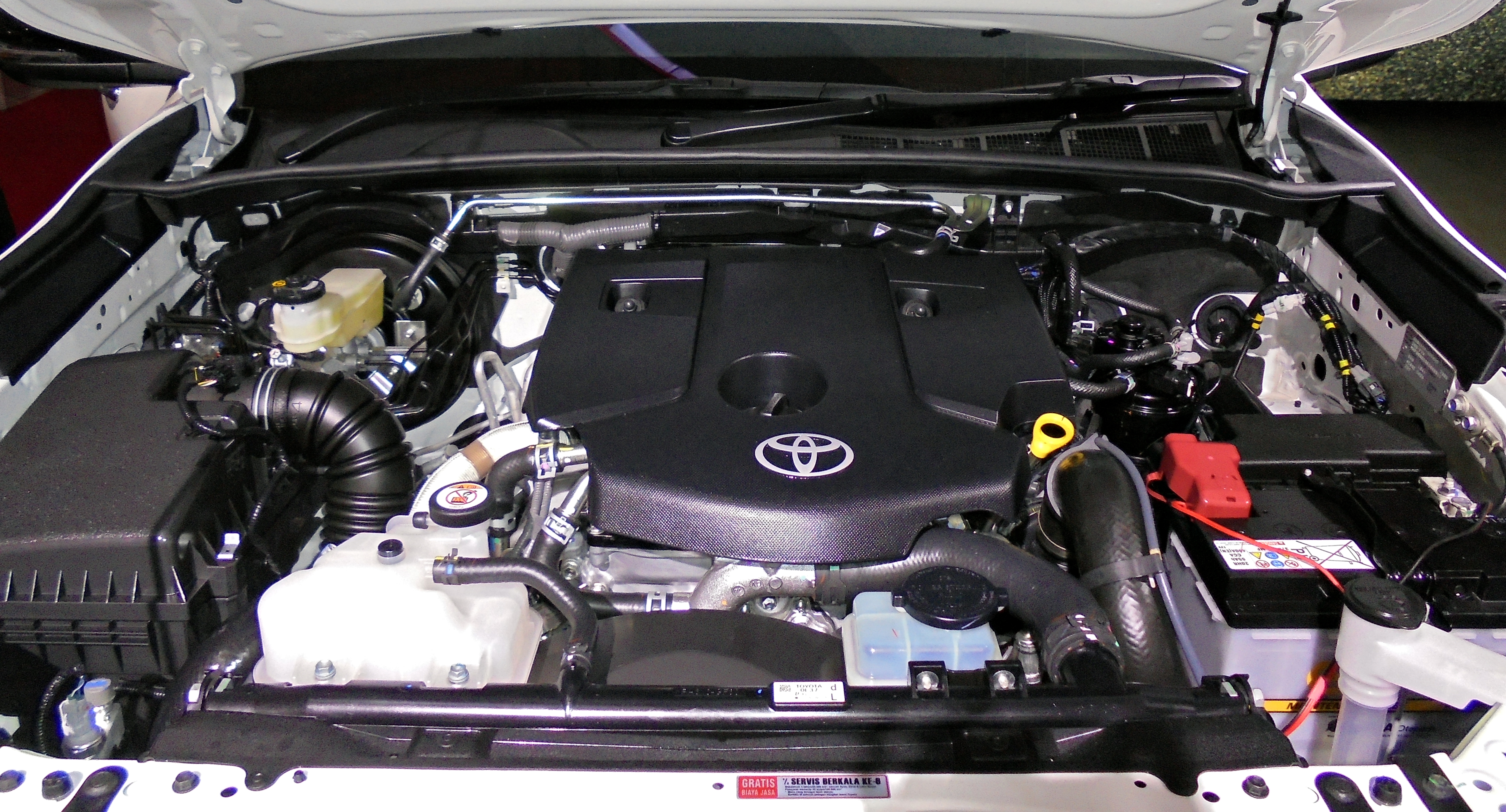 トヨタ・フォーチュナー 2GD-FTV エンジン